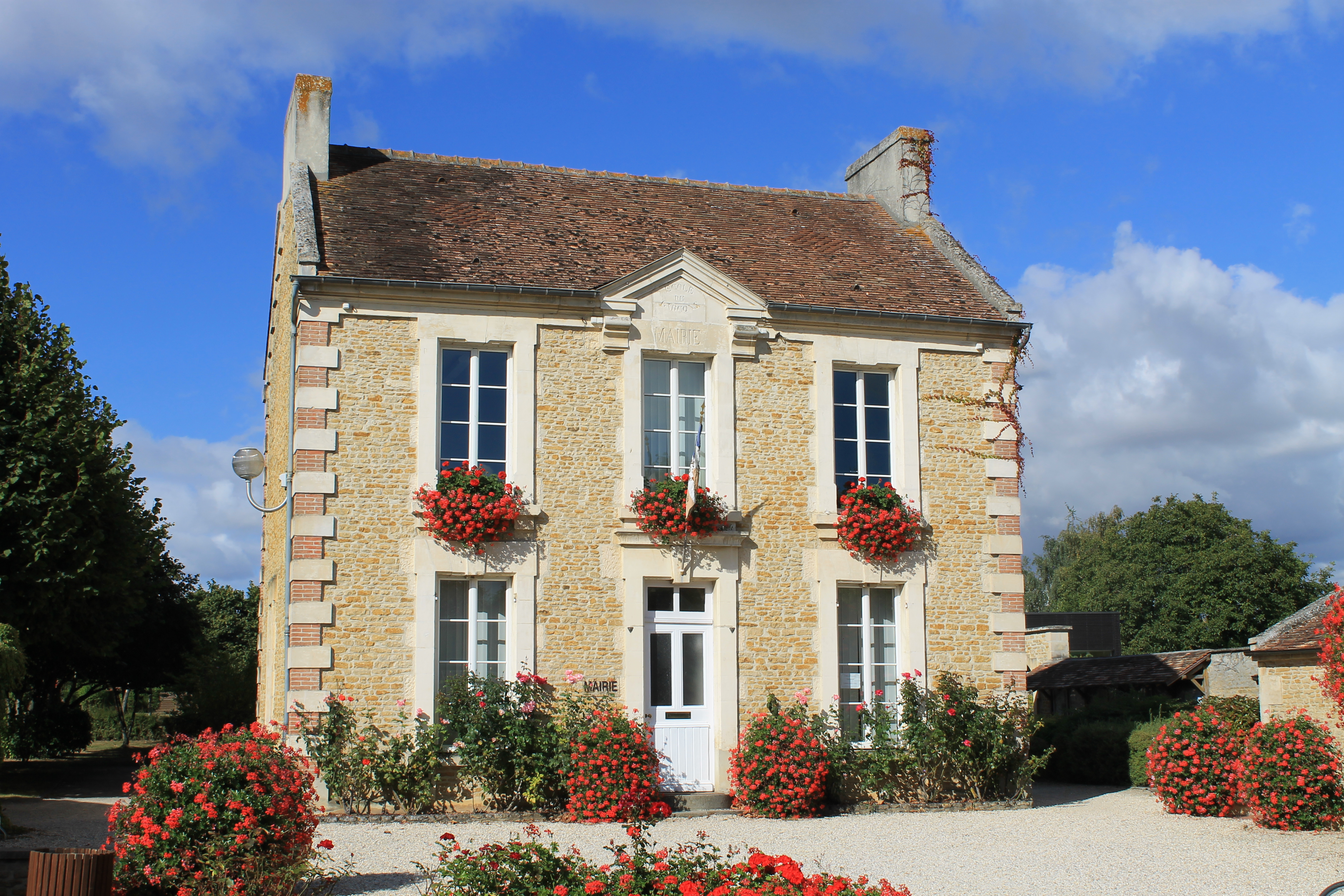 mairie de Moult (ancienne école des garçons) (Calvados)